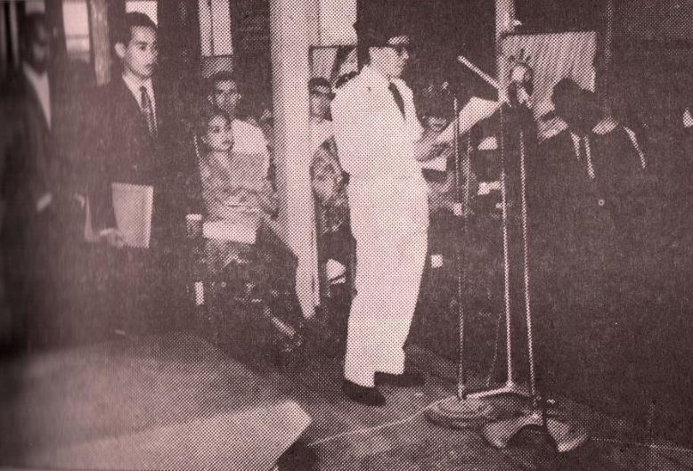 Pelantikan Moeis Hassan sebagai Gubernur Kaltim, 10 Agustus 1962.